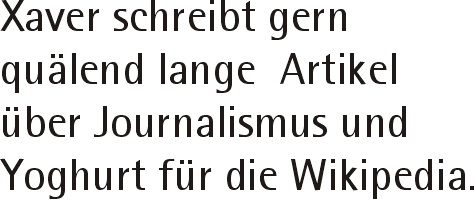 Darstellung zeigt ein Schriftmuster der Rotis Sans Serif Zeichnung erstellt 2003 von Benutzer:Sansculotte. Bild ist unter der GNU FDL zur weiteren Verwendung freigegeben. Quellenangabe und Beleg an erbeten.